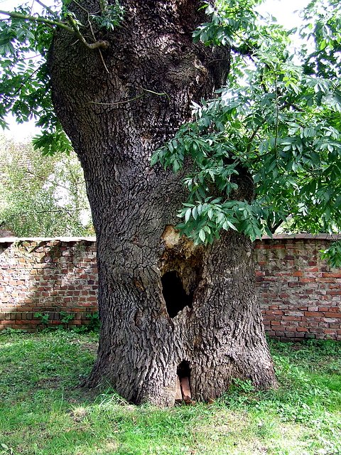 Jesion rosnący w pobliżu kościoła Niepokalanego Poczęcia Najświętszej Marii Panny w Raszowej